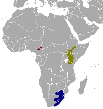 מפה